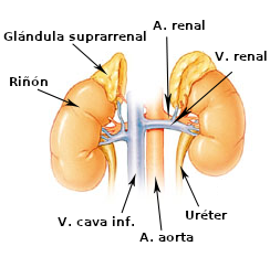 Esquema con leyendas mostrando glándula suprarrenal, riñón y uréter, así como venas cava inferior y renal, y arterias aorta y renal.